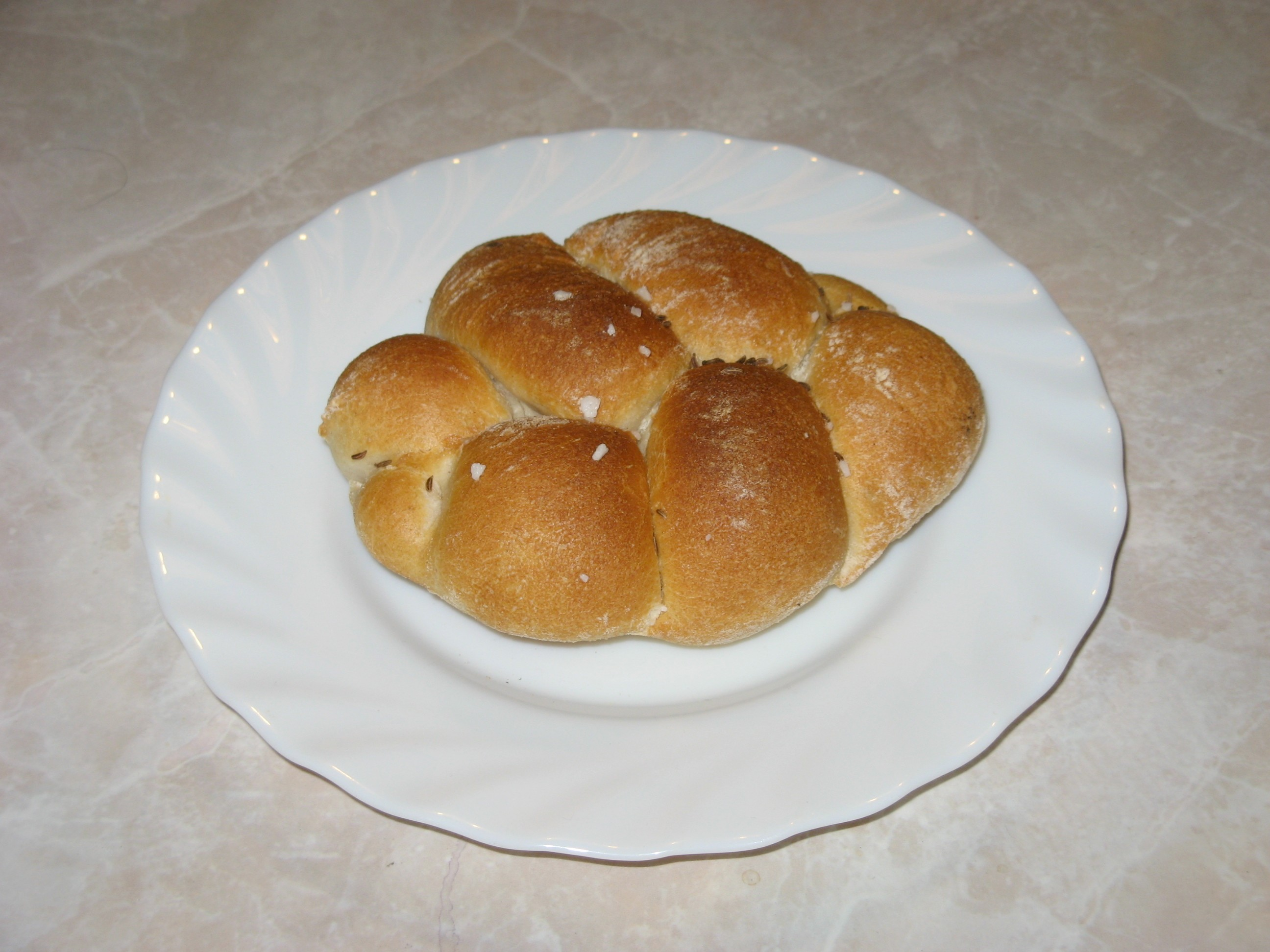 Česká houska se solí a kmínem.